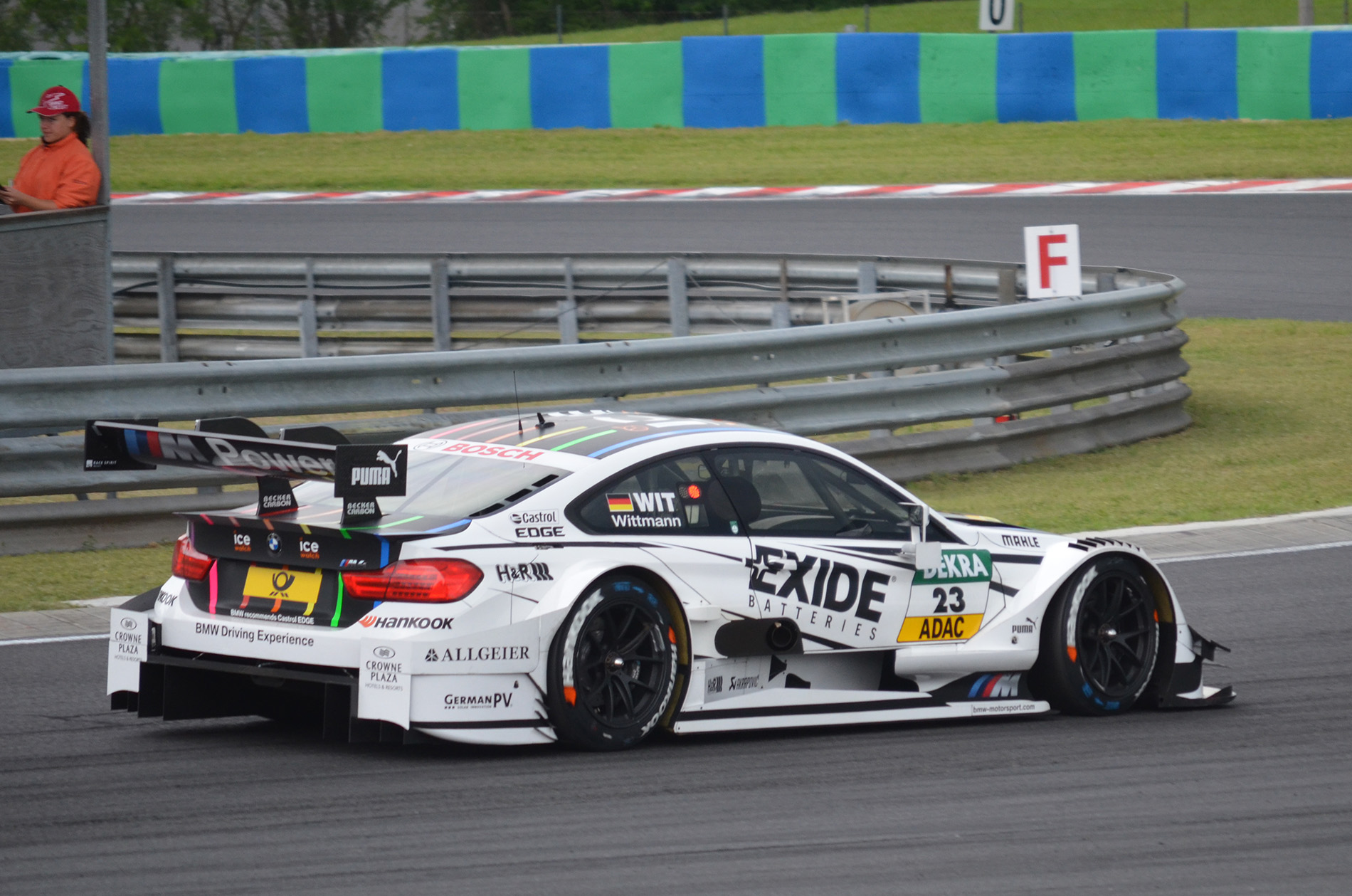 Marco Wittmann a DTM 2014-es magyar futamán.